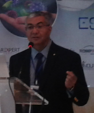 C'est le professeur Sumi Helal lors de la conférence ESBM 2017 tenue à Sfax en mai 2017.